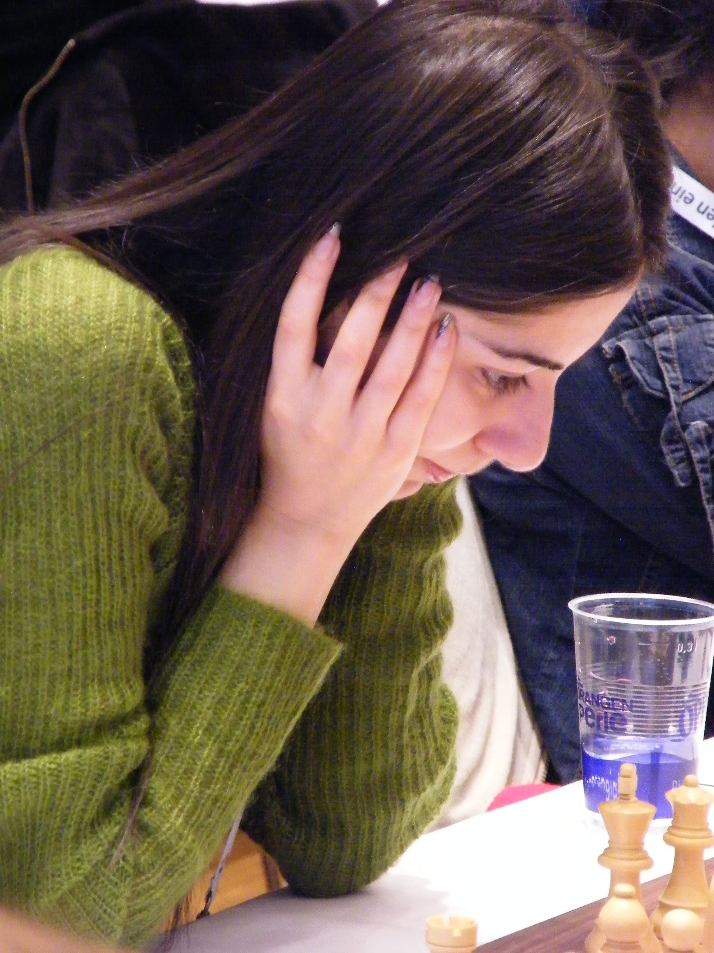 Lilit Mkrtchian bei der 38. Schacholympiade in Dresden 2008